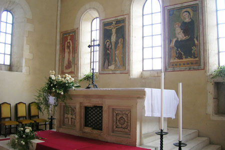 Dipinti di Antonio Martini Di Atri presso la chiesa abbaziale di Santa Maria Arabona,Manoppello (PE)-Italy. Foto scattata da Alan_p.